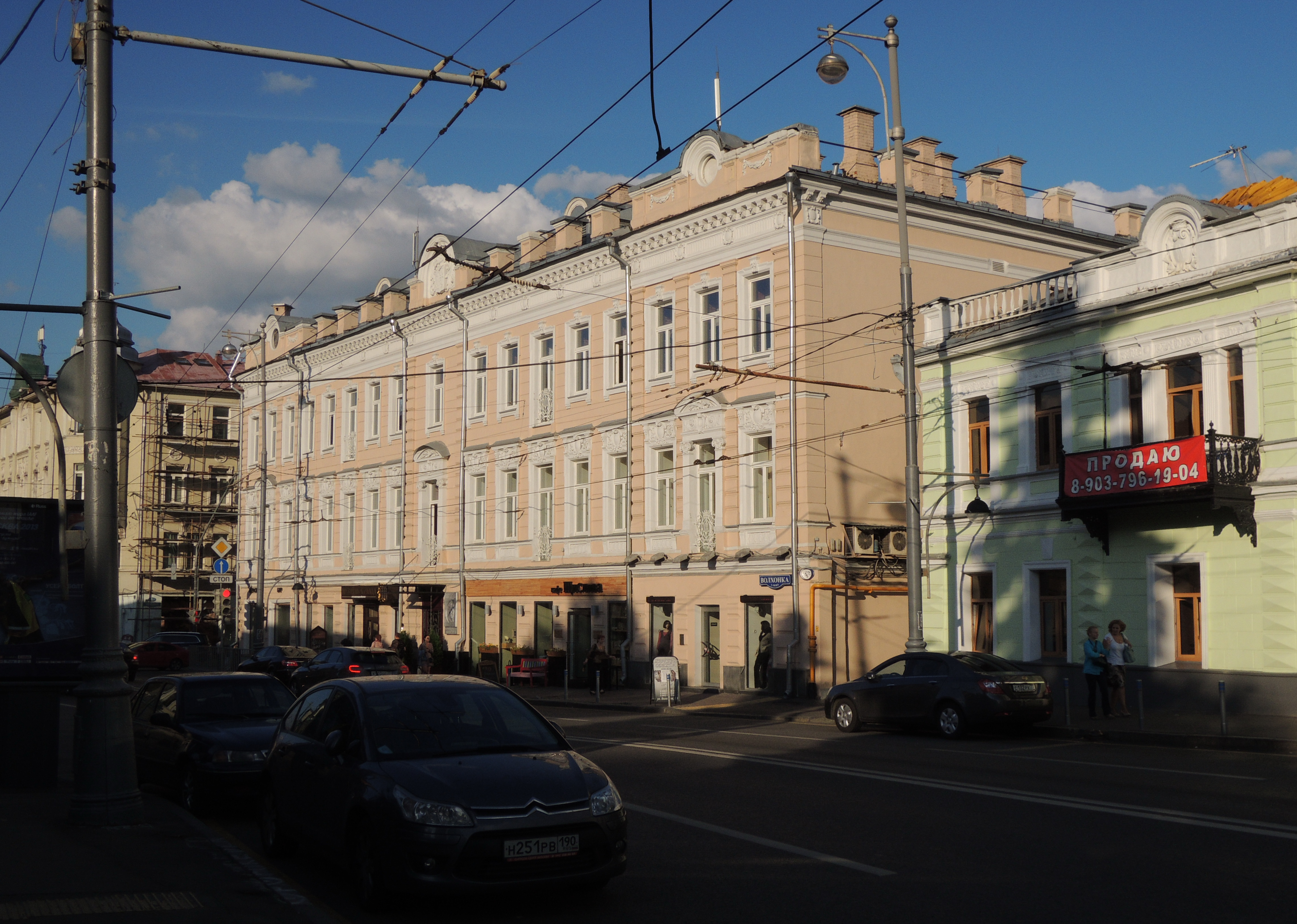 Москва, Волхонка